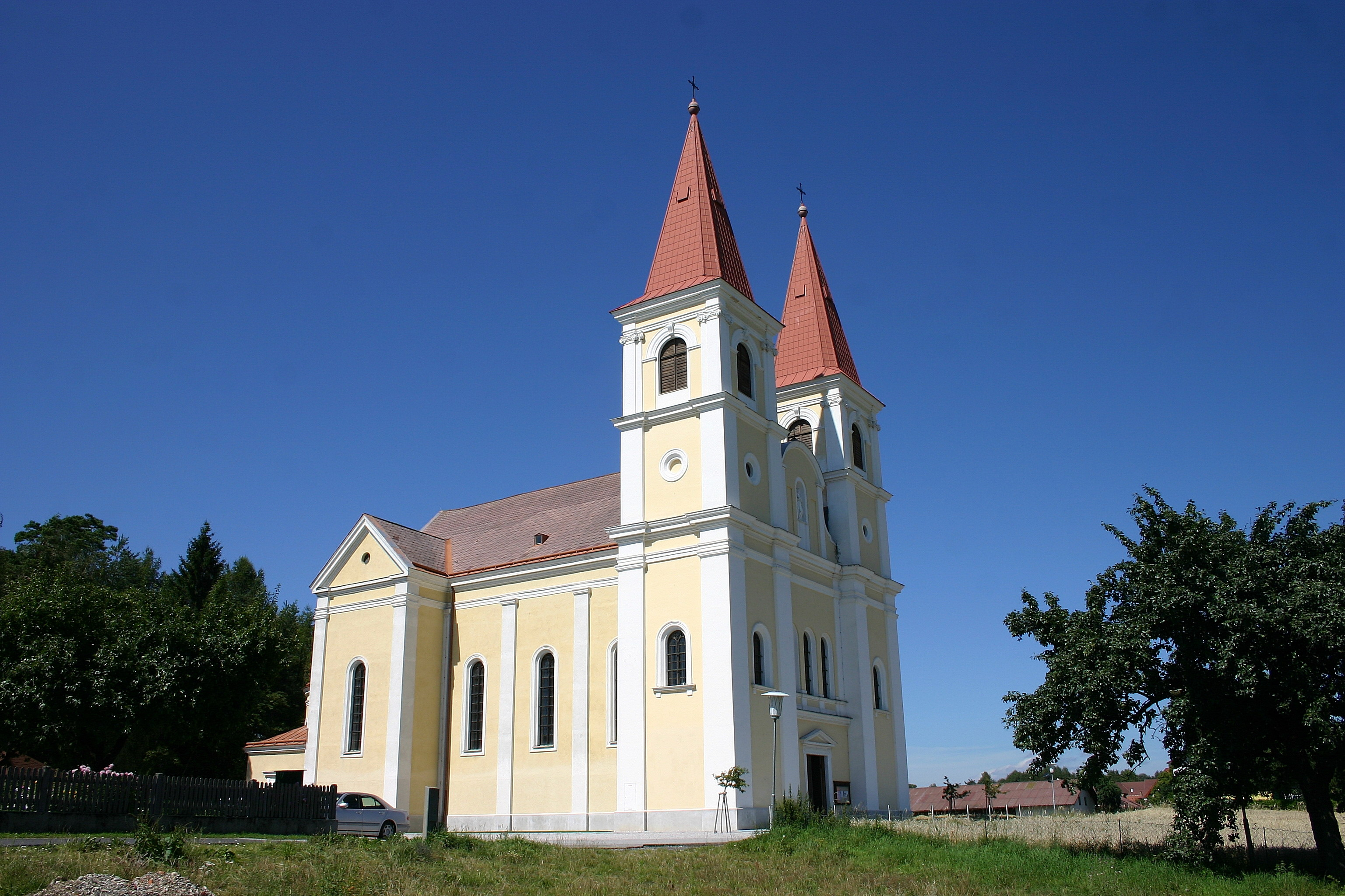 Wallfahrtskirche Maria Schnee im Ortsteil Kaltenberg in der Gemeinde Lichtenegg in der Buckligen Welt (Niederösterreich)